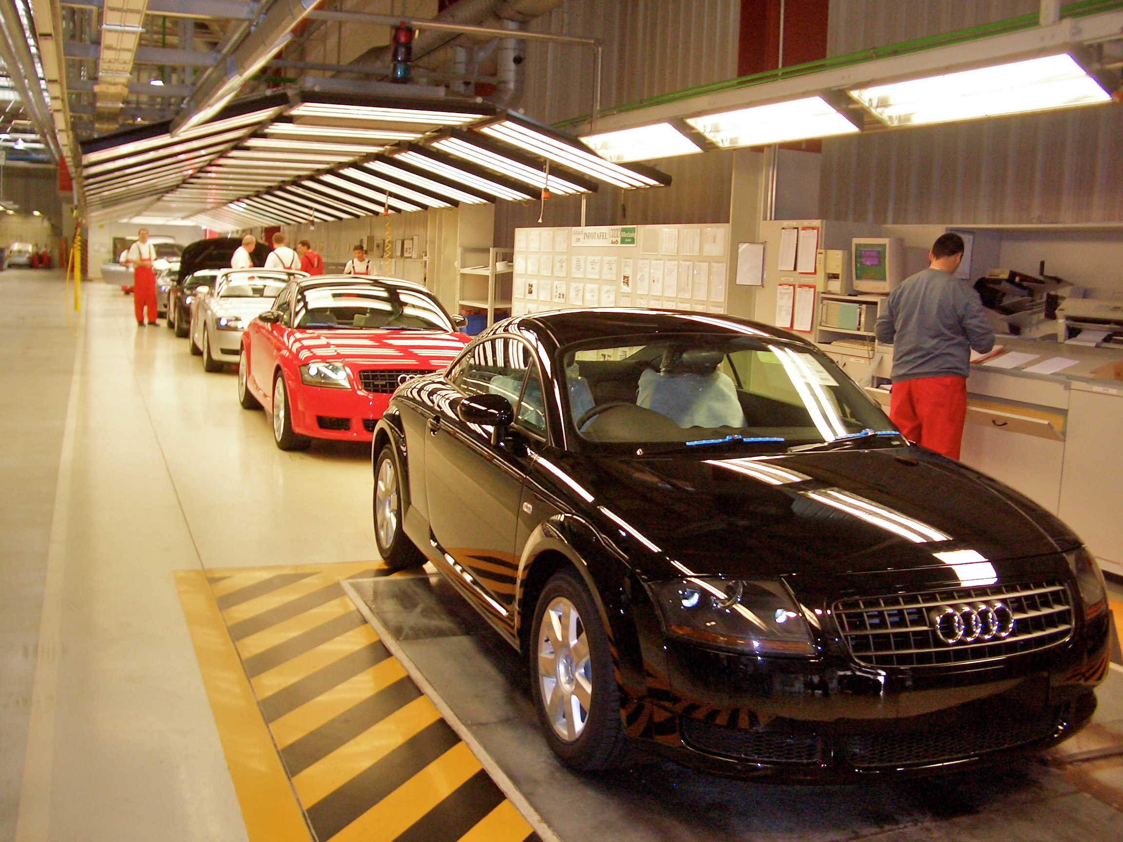 Audi TT Modelljahr 2005, Endkontrolle der fertig montierten Fahrzeuge in Györ